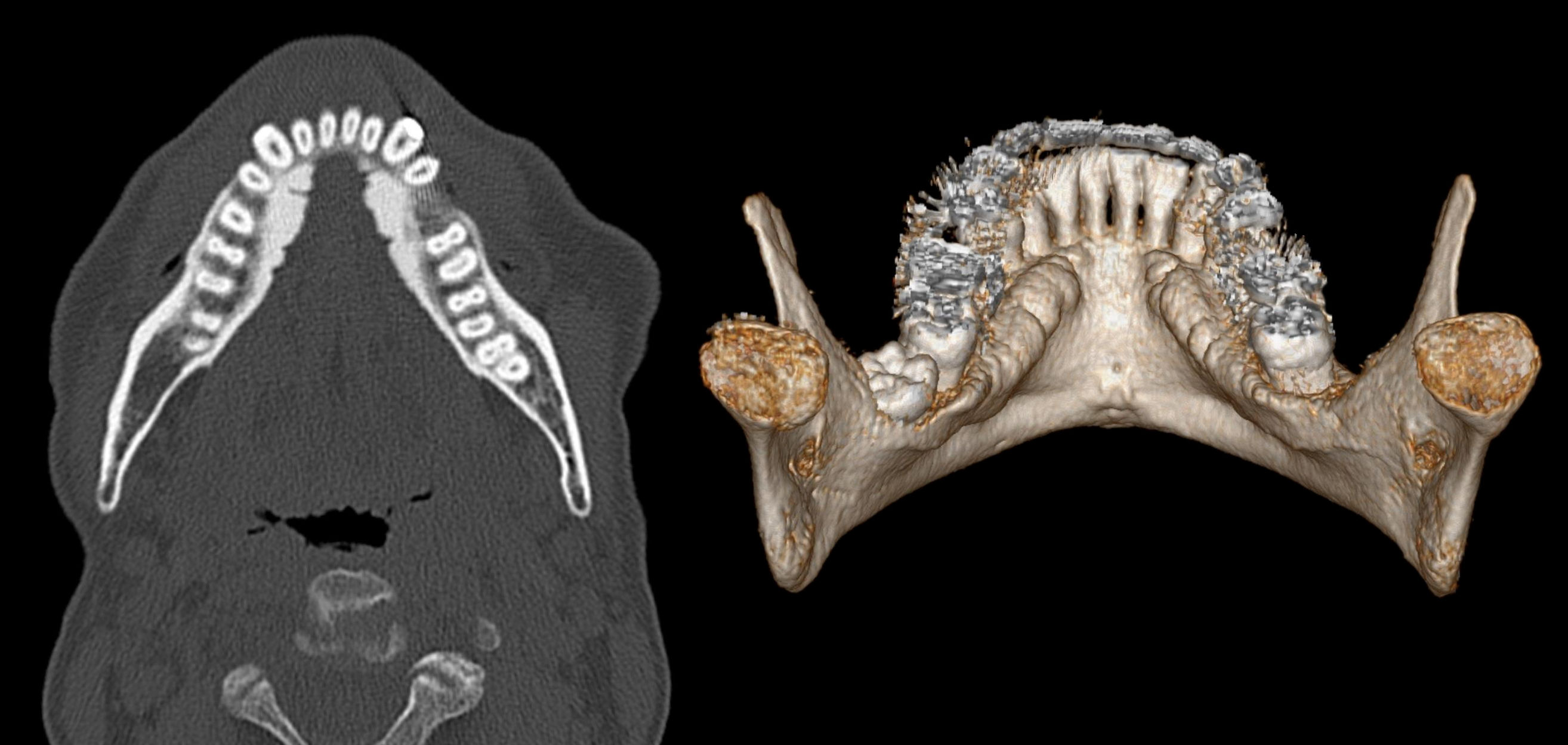 Torus mandibularis in der Computertomographie, links axial, rechts als 3D-Rekonstruktion (Volumen rendering). Zufallsbefund bei einem jungen Mann.